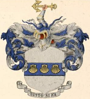 La Trobe suguvõsa aadlivapp